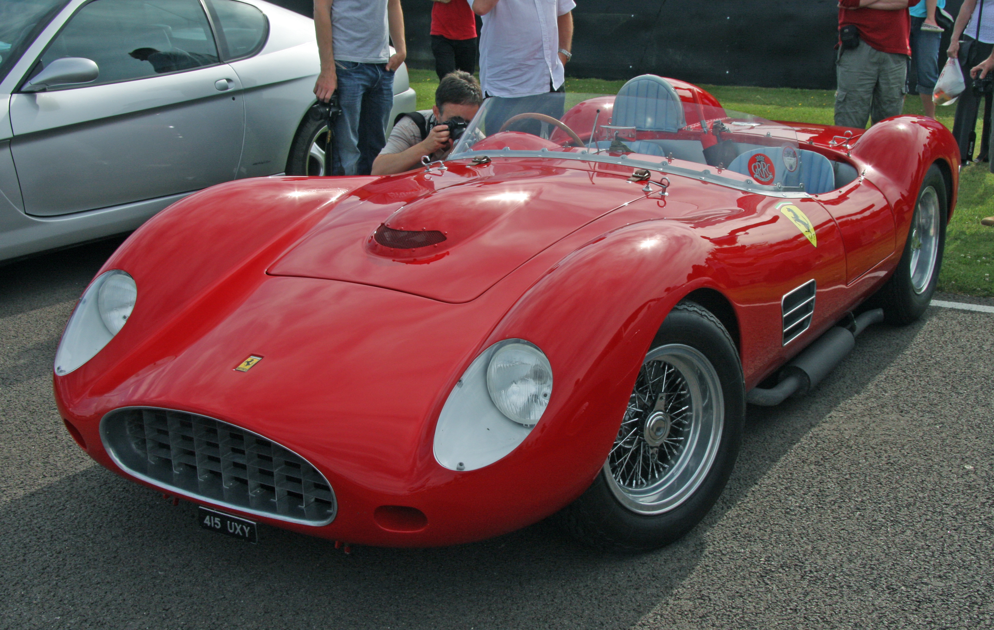 Ferrari 196S